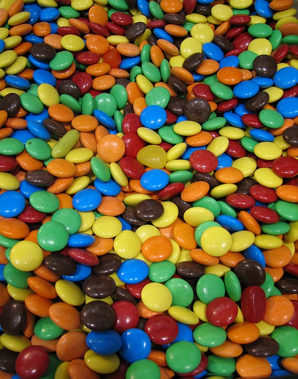 Chocolate Buttons